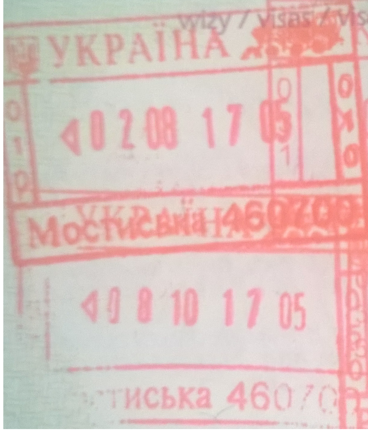 Stemple paszportowe na przejściu kolejowym Przemyśl-Mościska